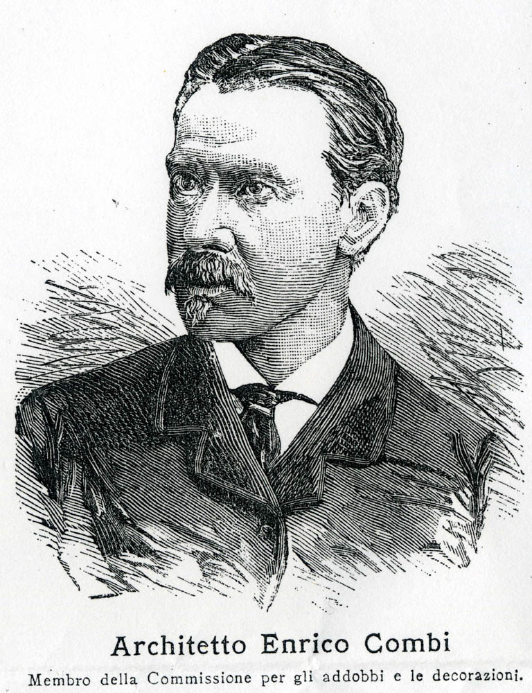 Architetto e ingegnere italiano